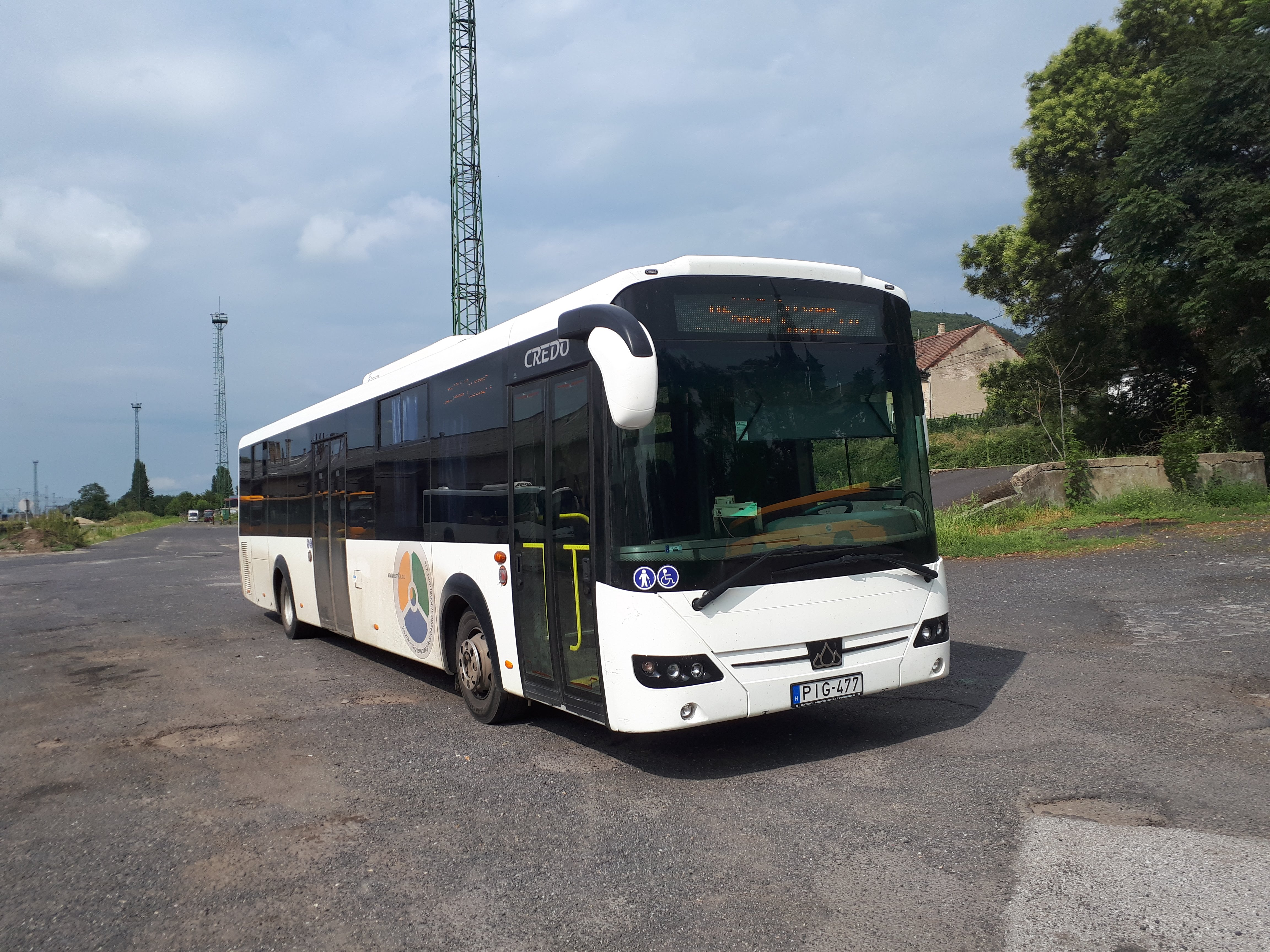 Az ÉMKK PIG-477 rendszámú Credo Econell 12 típusú busza Sátoraljaújhelyen, a 3925-ös helyközi járaton.